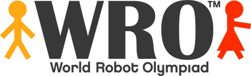 Logo der World Robot Olympiad